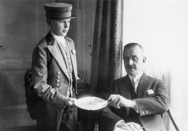 Zentralbild Thomas Mann, bürgerlich - humanistischer Schriftsteller von Weltgeltung. geb.: 6.6.1875 in Lübeck gest.: 12.8.1955 Kilchberg (Schweiz) 1929 erhielt er den Nobelpreis. Thomas Mann im Hotel Adlon Berlin. Von dort aus wird Thomas Mann nach Stockholm reisen, um den Nobelpreis in Empfang zu nehmen (1929). UBz.: Der Page bei der Anmeldung eines Besuchers. 41 175-29 [Scherl Bilderdienst99